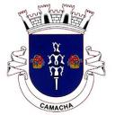 Brasão da Camacha